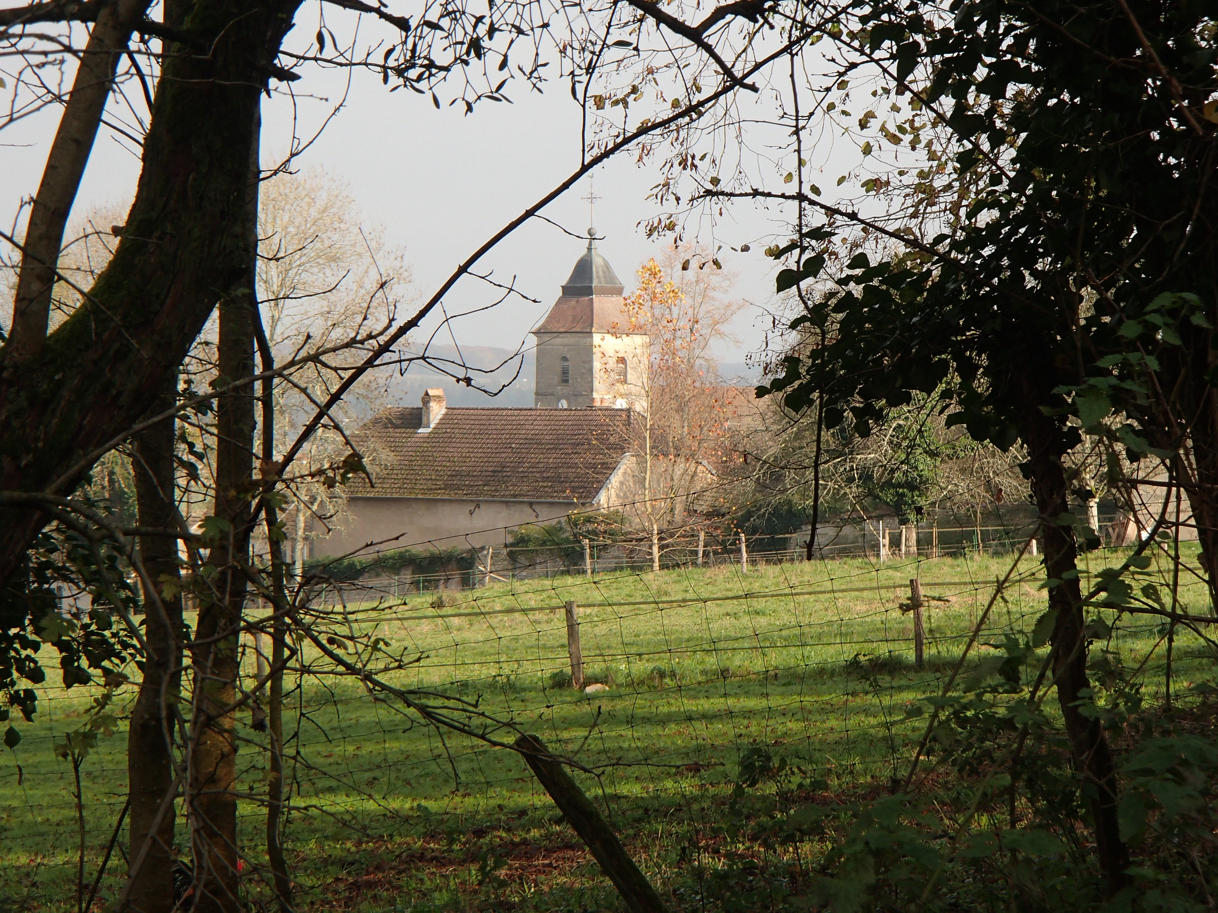 Eglise